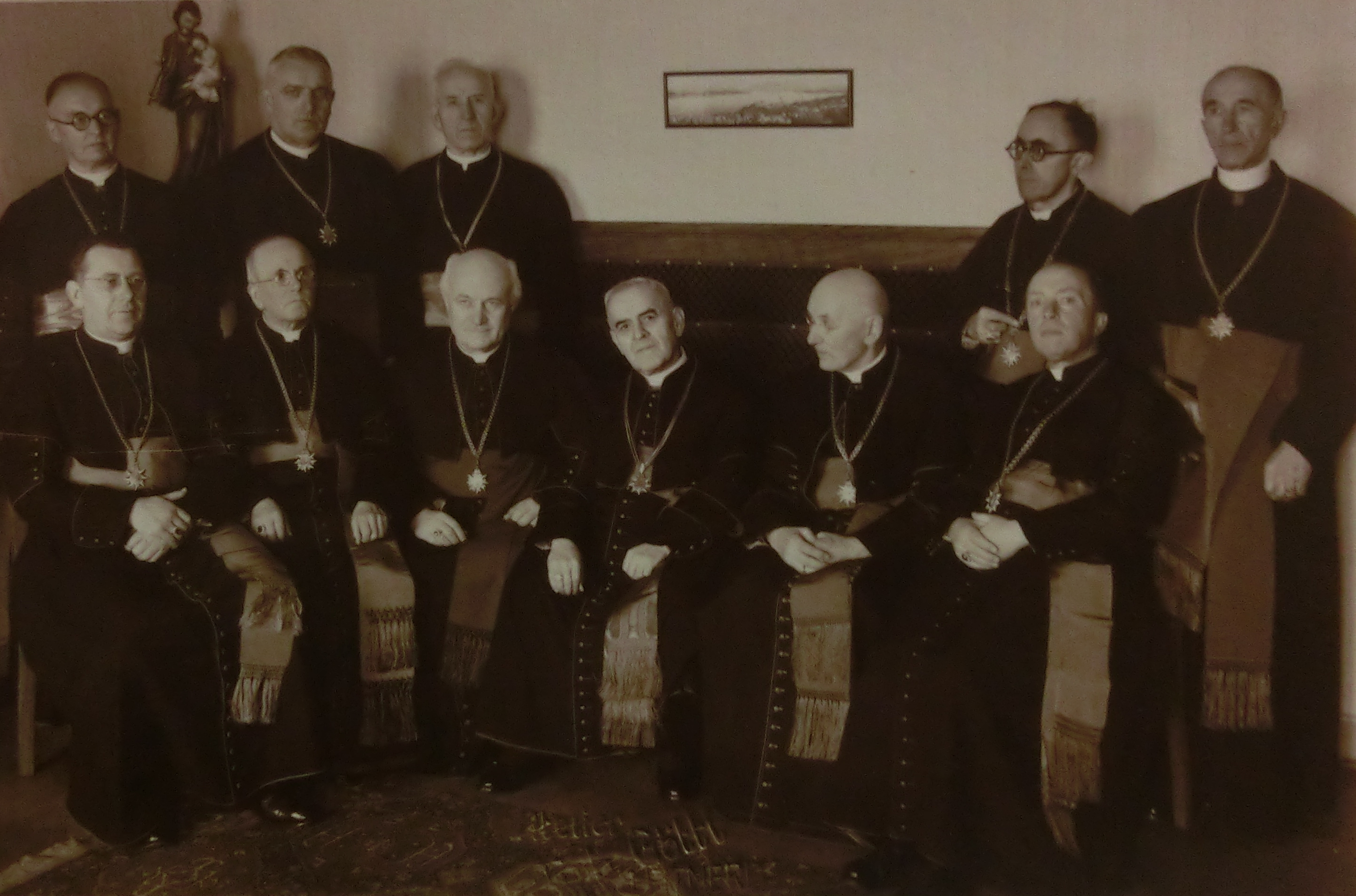 Setkání kanovníků litoměřické svatoštěpánské kapituly v roce 1940